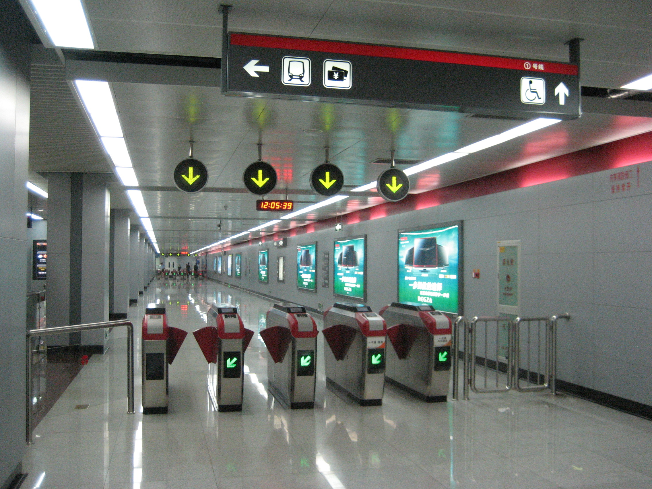 天津地鐵驗票的閘機